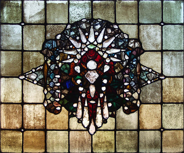 76 x 95 cm. Don de M. Robert Heitz en 1965